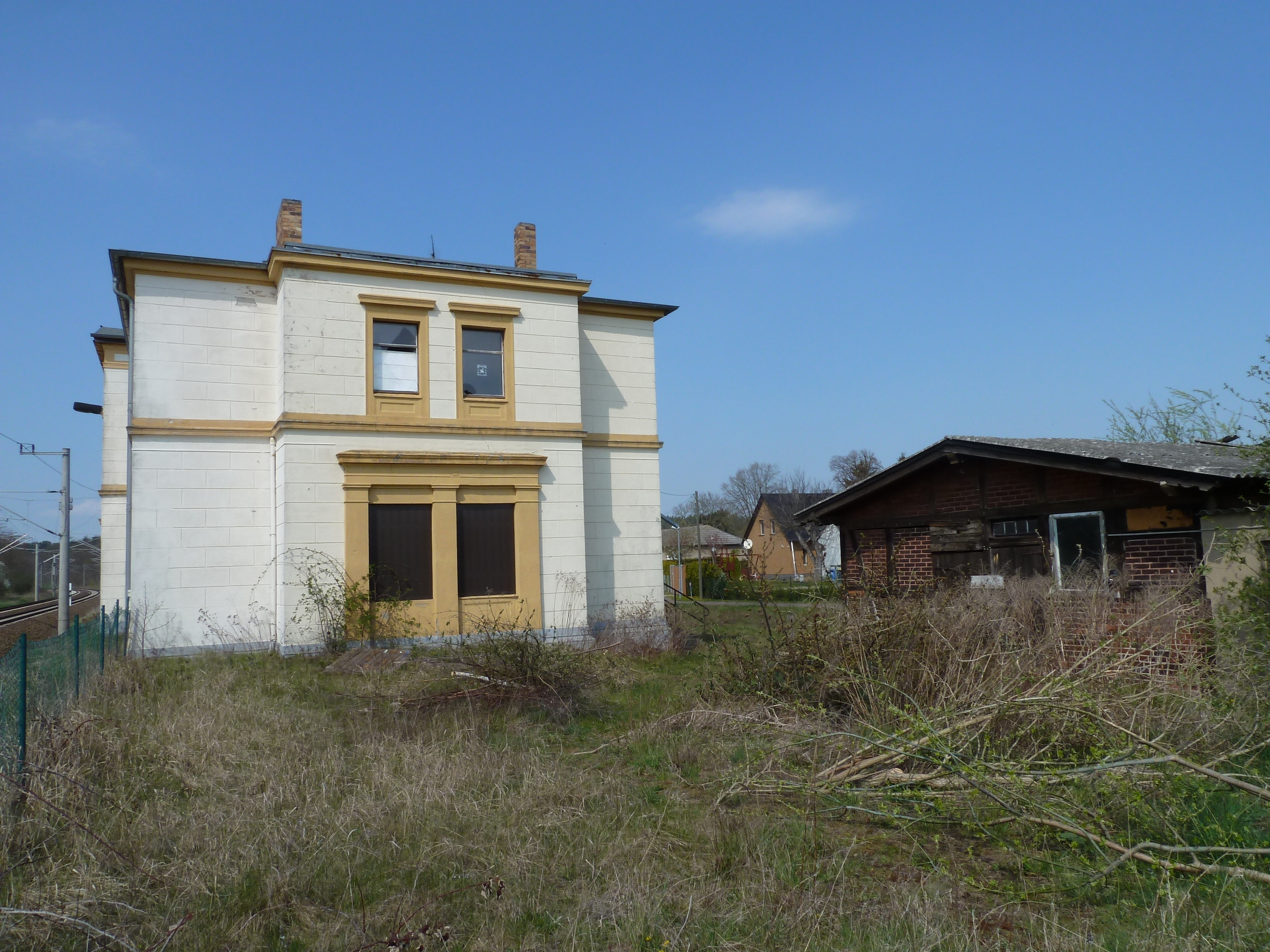 Denkmalgeschützter Bahnhof Zernitz, Toilettenhäuschen und Ostseite des Bahnhofsgebäudes.